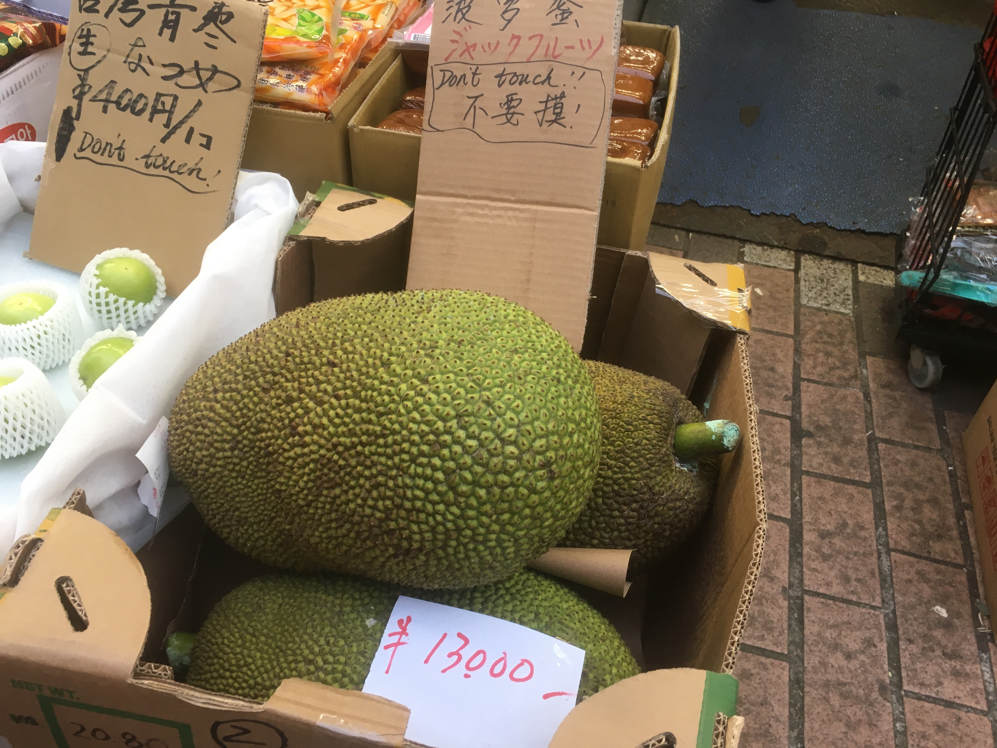 パラミツ、上野にて (jackfruit in Ueno)